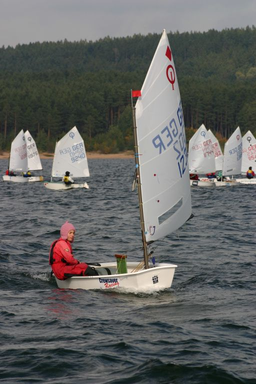 Paulina Rothlauf auf dem Großen Brombachsee